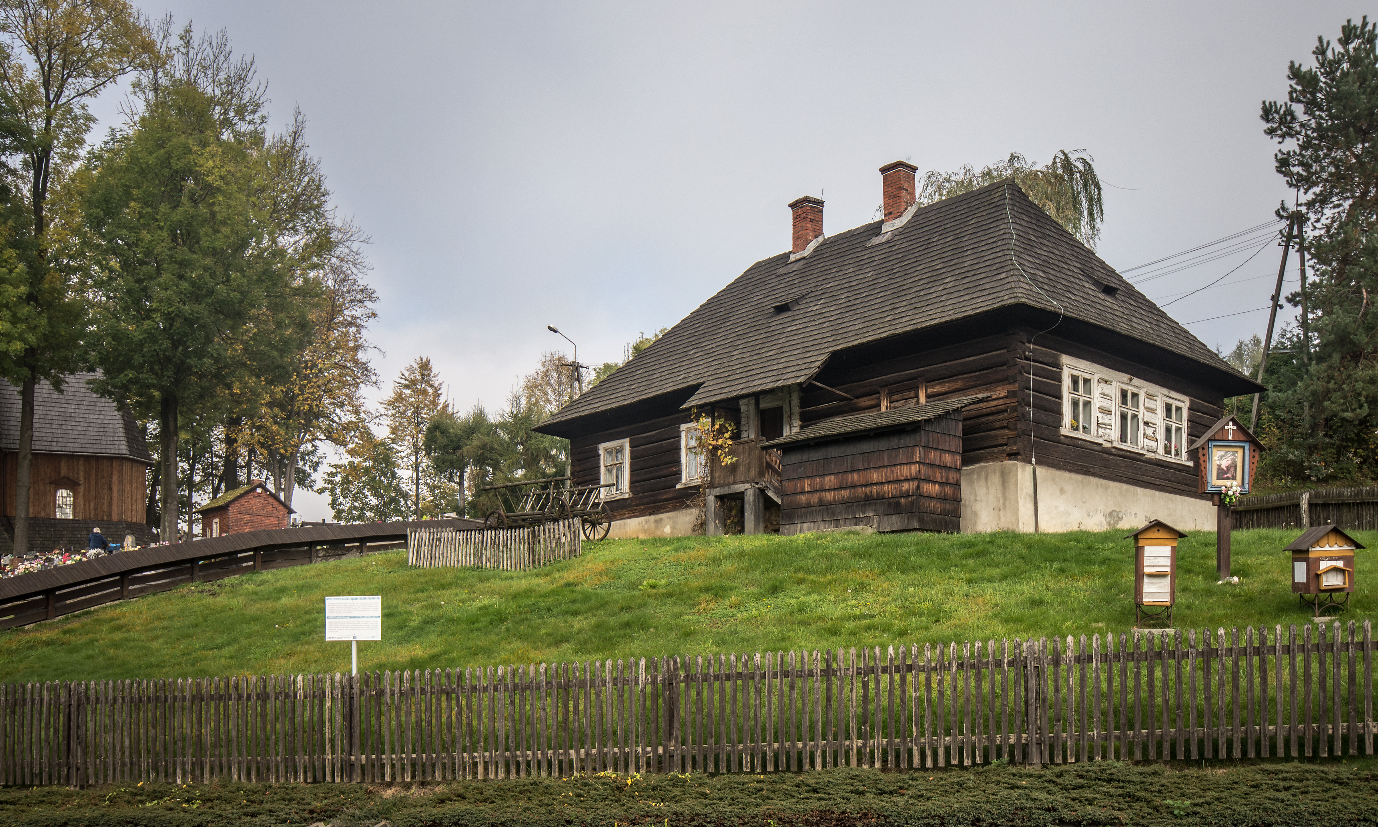 Stara Wieś, d. szkoła parafialna, ob. izba muzealna (dec. chałupa nr 169), 1787, 1862, 1974-1976